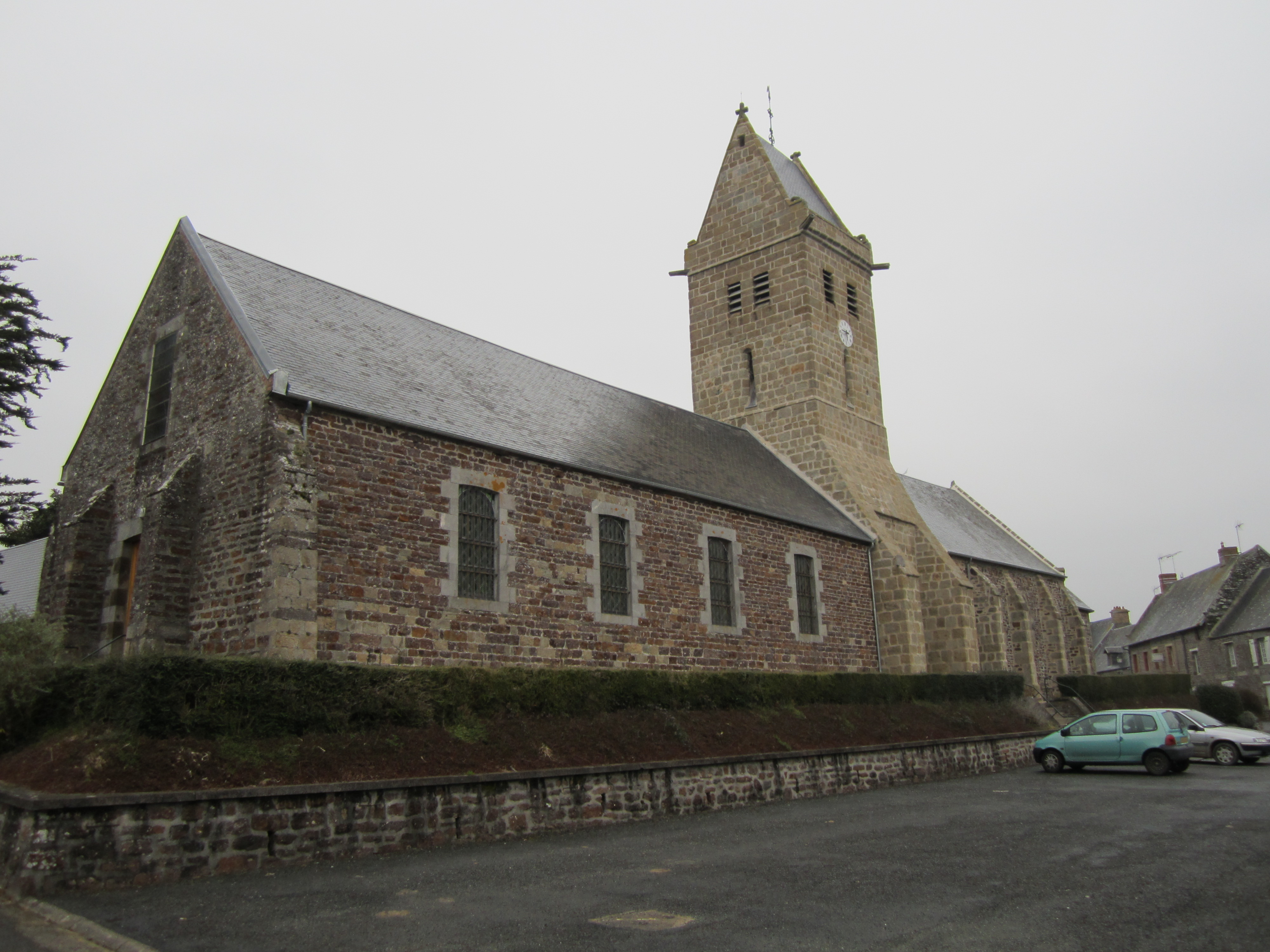 Église Notre-Dame d'Hudimesnil